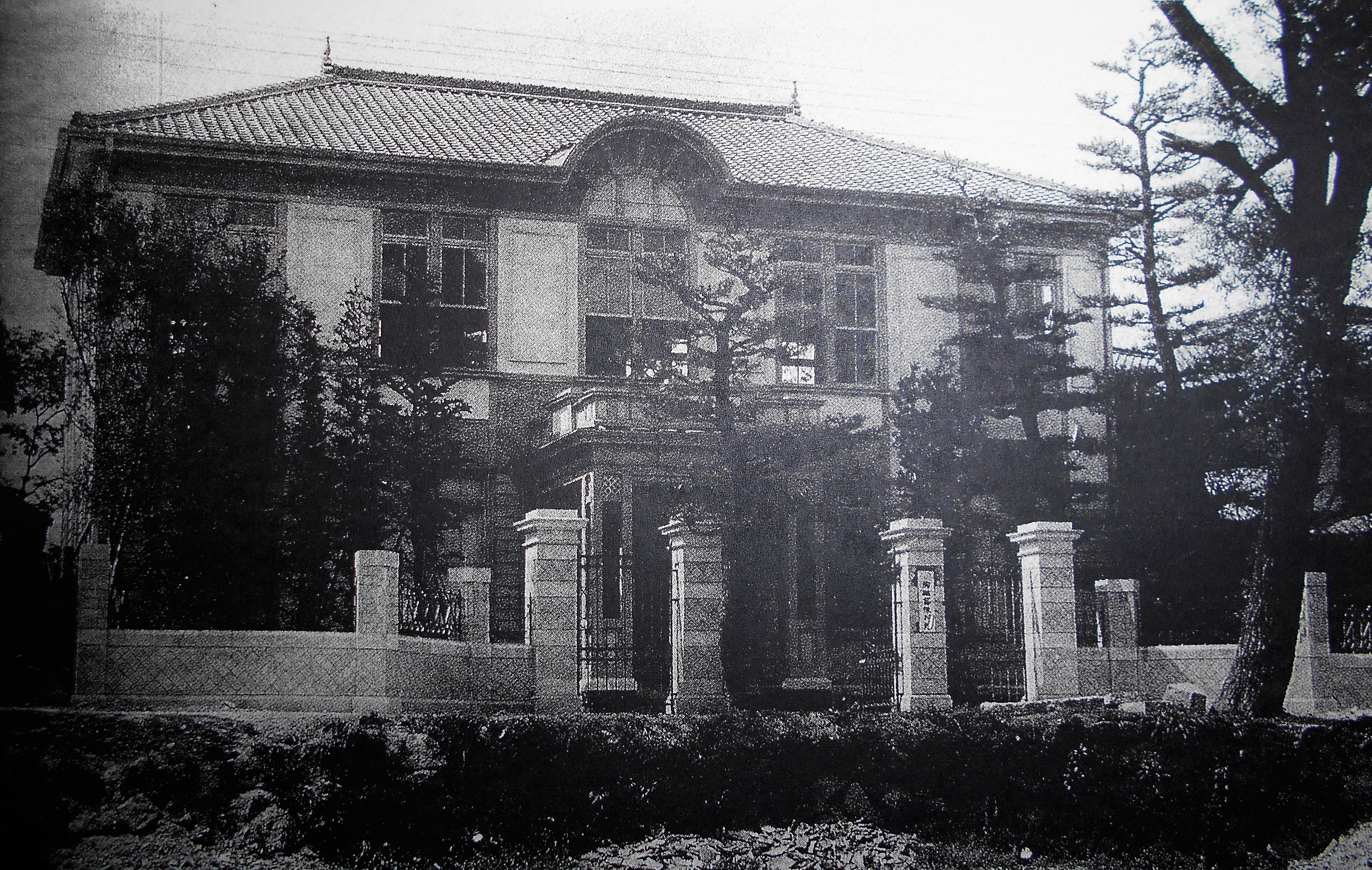 愛知県瀬戸市にあった陶磁器陳列館。1914年6月竣工。